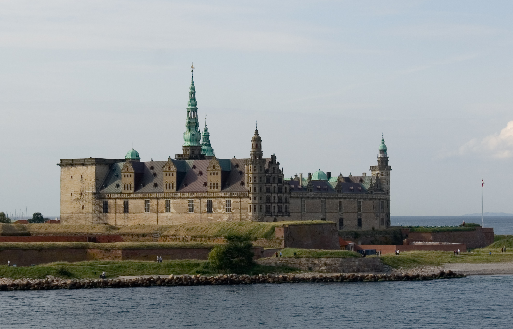 Kronborg Castle, Helsingør, Denmark